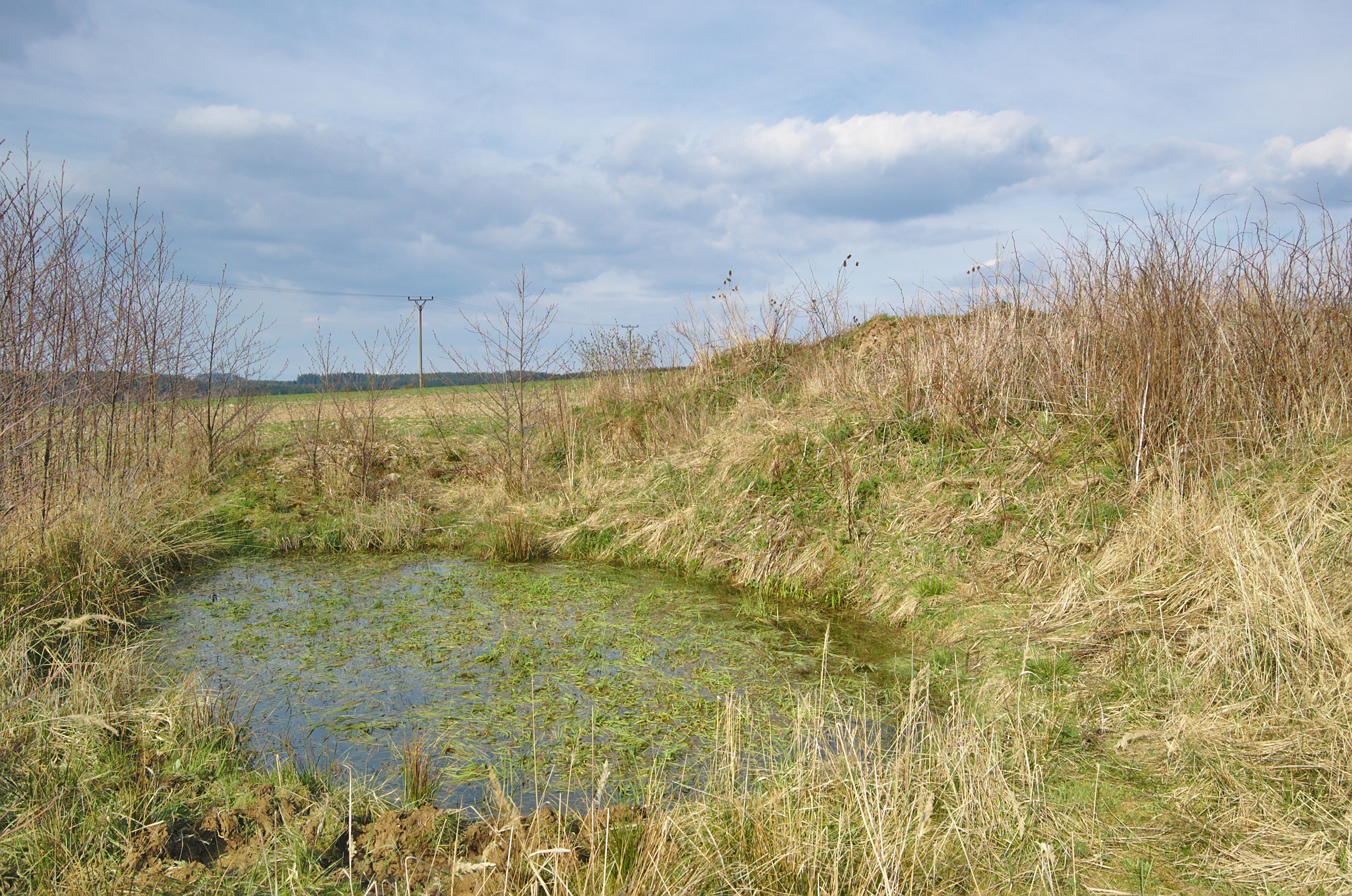 Jezírko v blízkosti prameniště Bělé, Pavlov, Benešov, okres Blansko